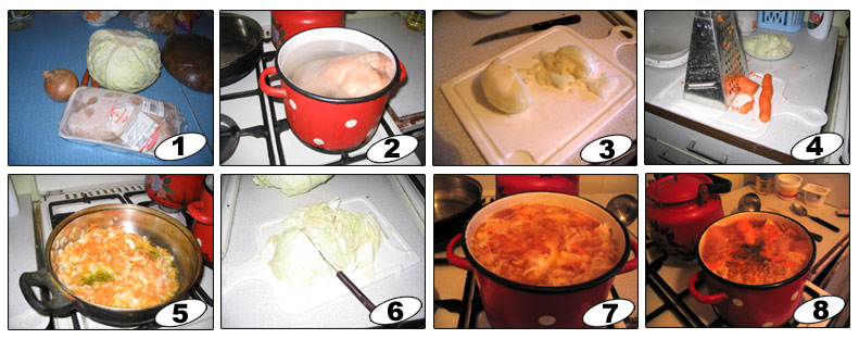 Борщ